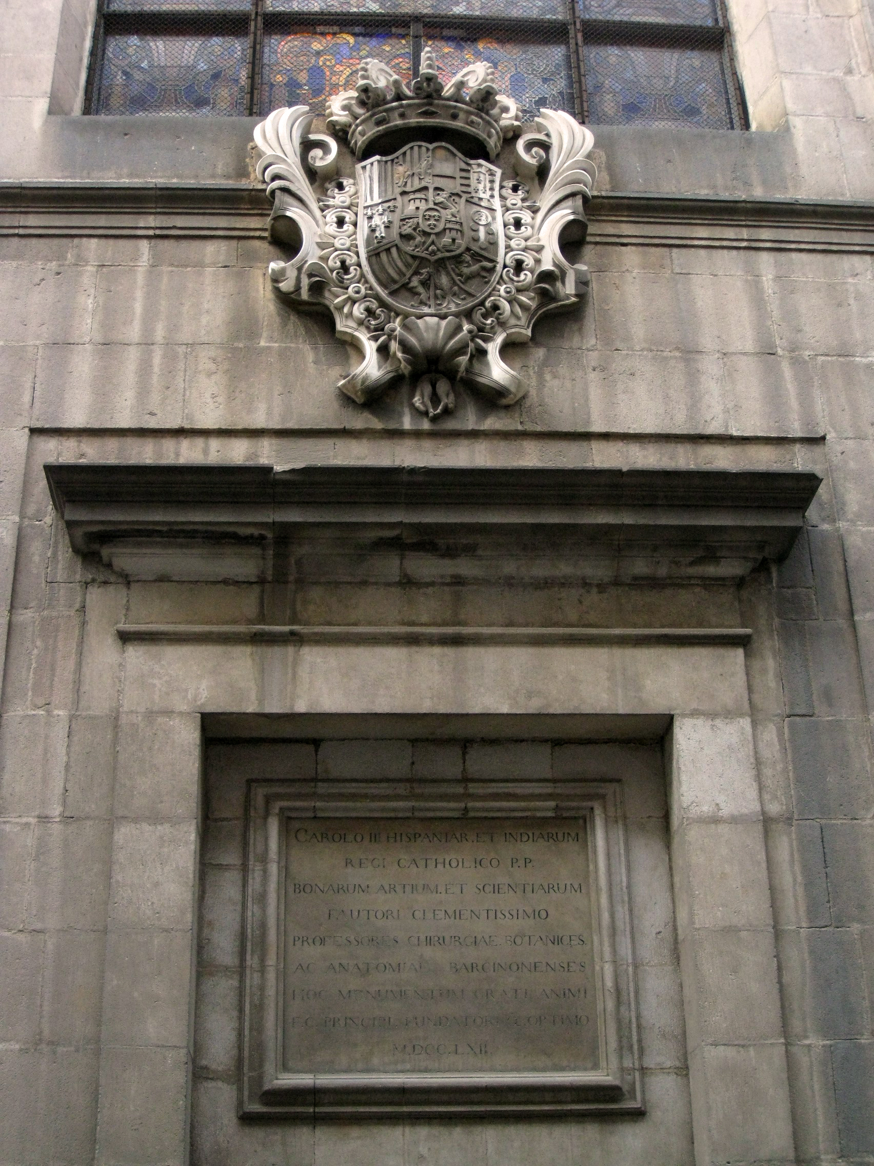 Escut i inscripció commemorativa a la Reial Acadèmia de Medicina de Catalunya, antic Col·legi de Cirurgia (1761), al Raval de Barcelona.